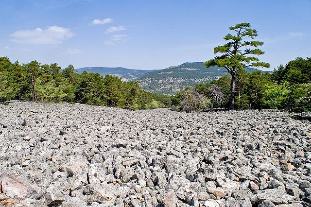 Uno de los rios de piedra de Orihuela del Tremedal